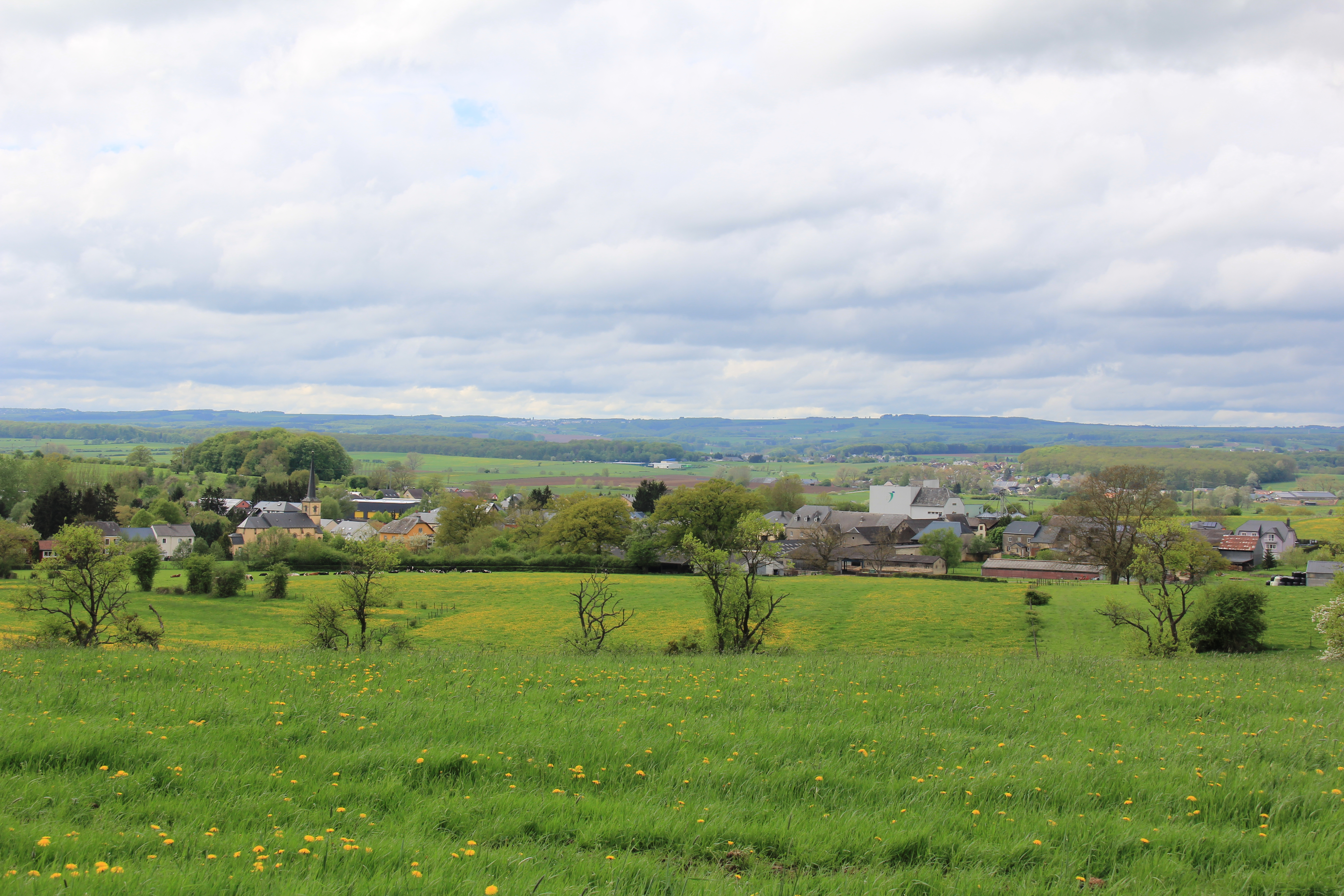 Näerden vum Héibierg aus gesinn, Mee 2013